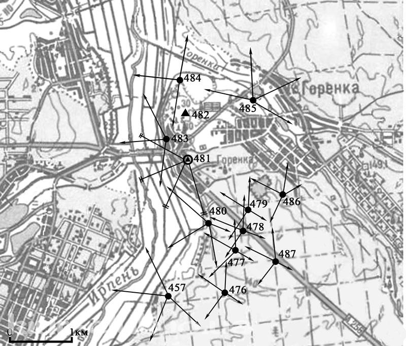 Схема БРО 1 Київського укріпленого району, викладена у вільний доступ авторами книги "Киевский укрепленный район 1928—1941" (